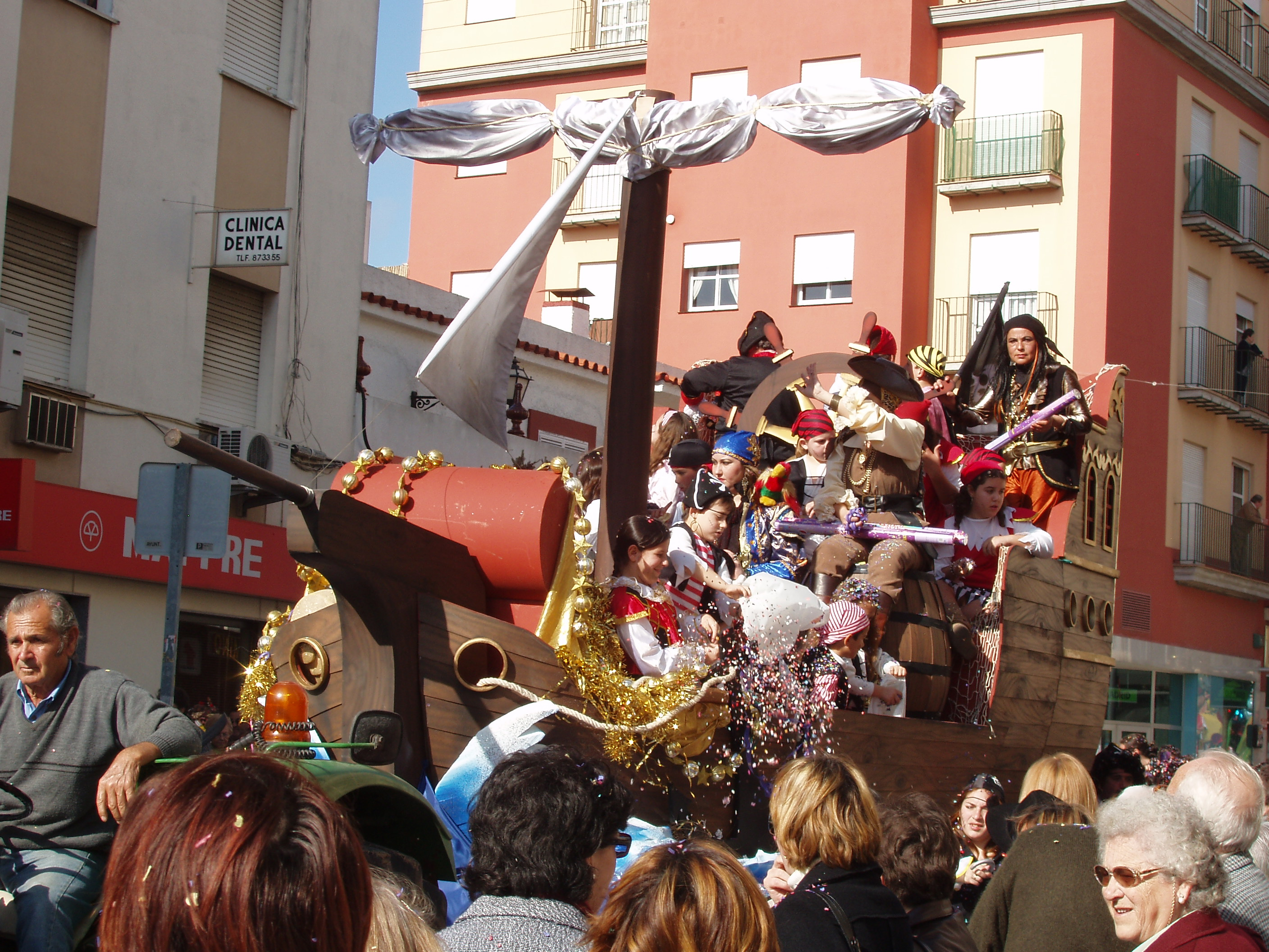 Carroza de Carnaval 2007, en El Puerto de Santa María.